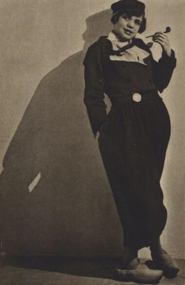 Mobi Urbanová v holandském kostýmu (Pestrý týden 1928)